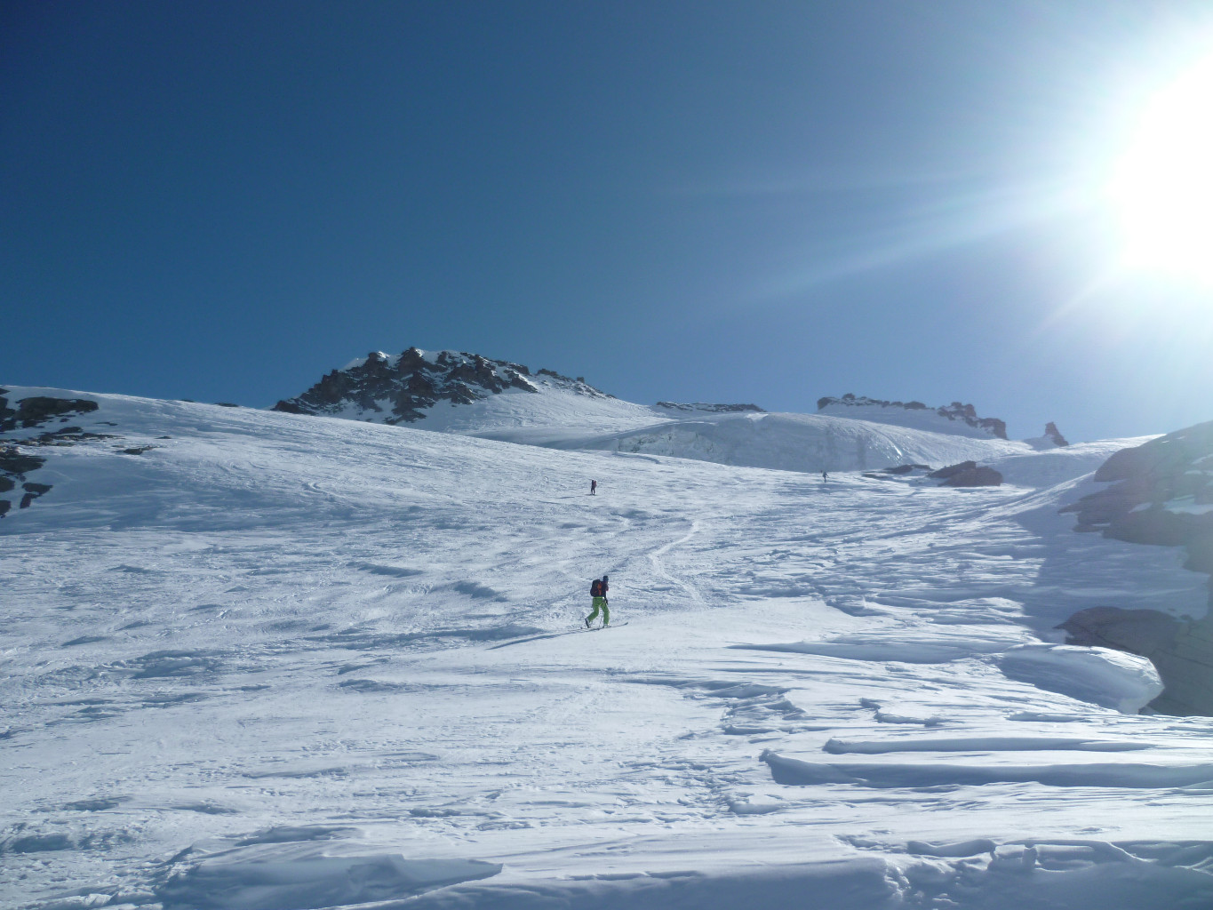 Le sommet apparaît avec le soleil